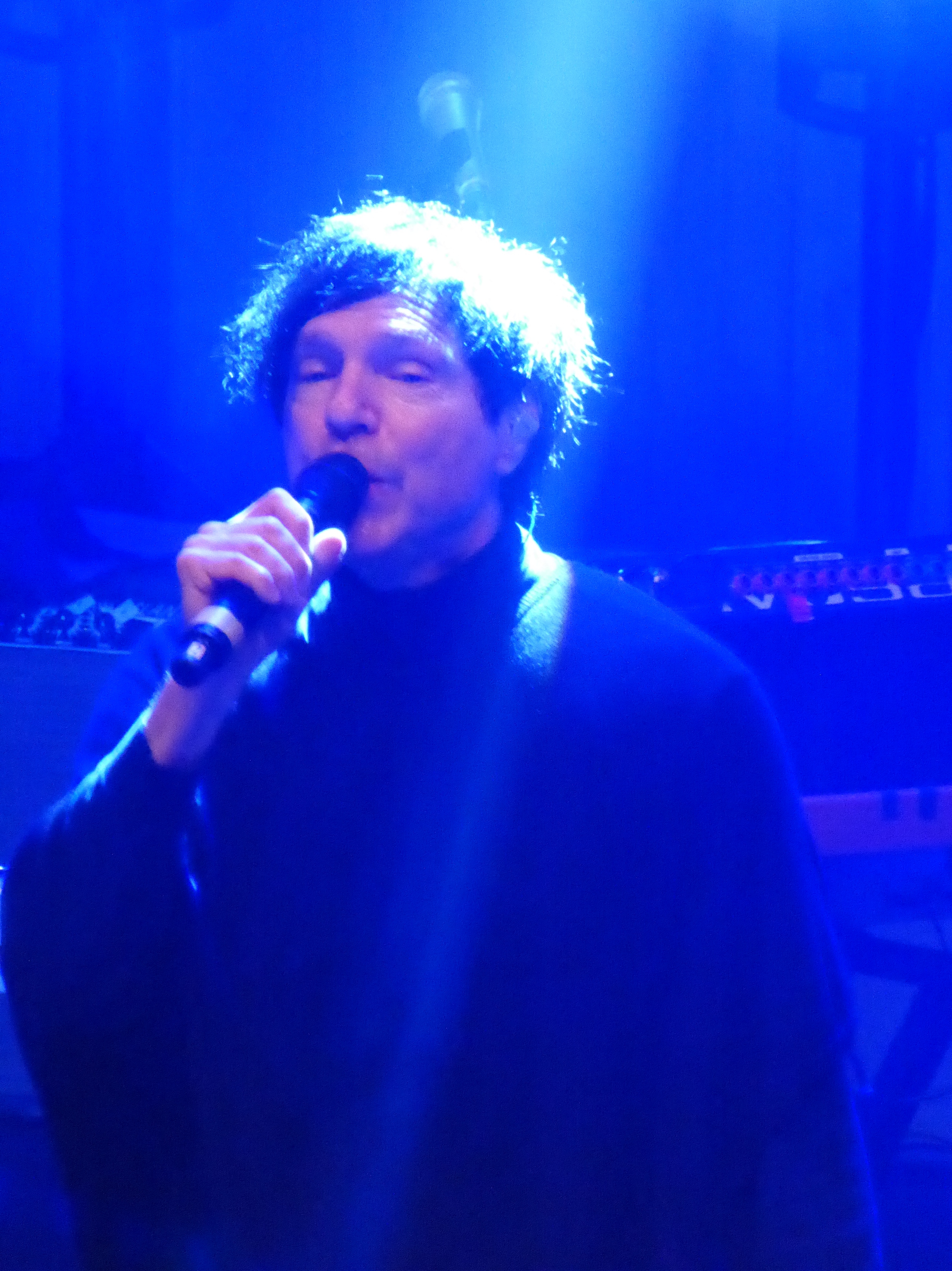 Russell Mael of FFS (Franz Ferdinand & Sparks) @ Albert Hall, Manchester 25/8/2015